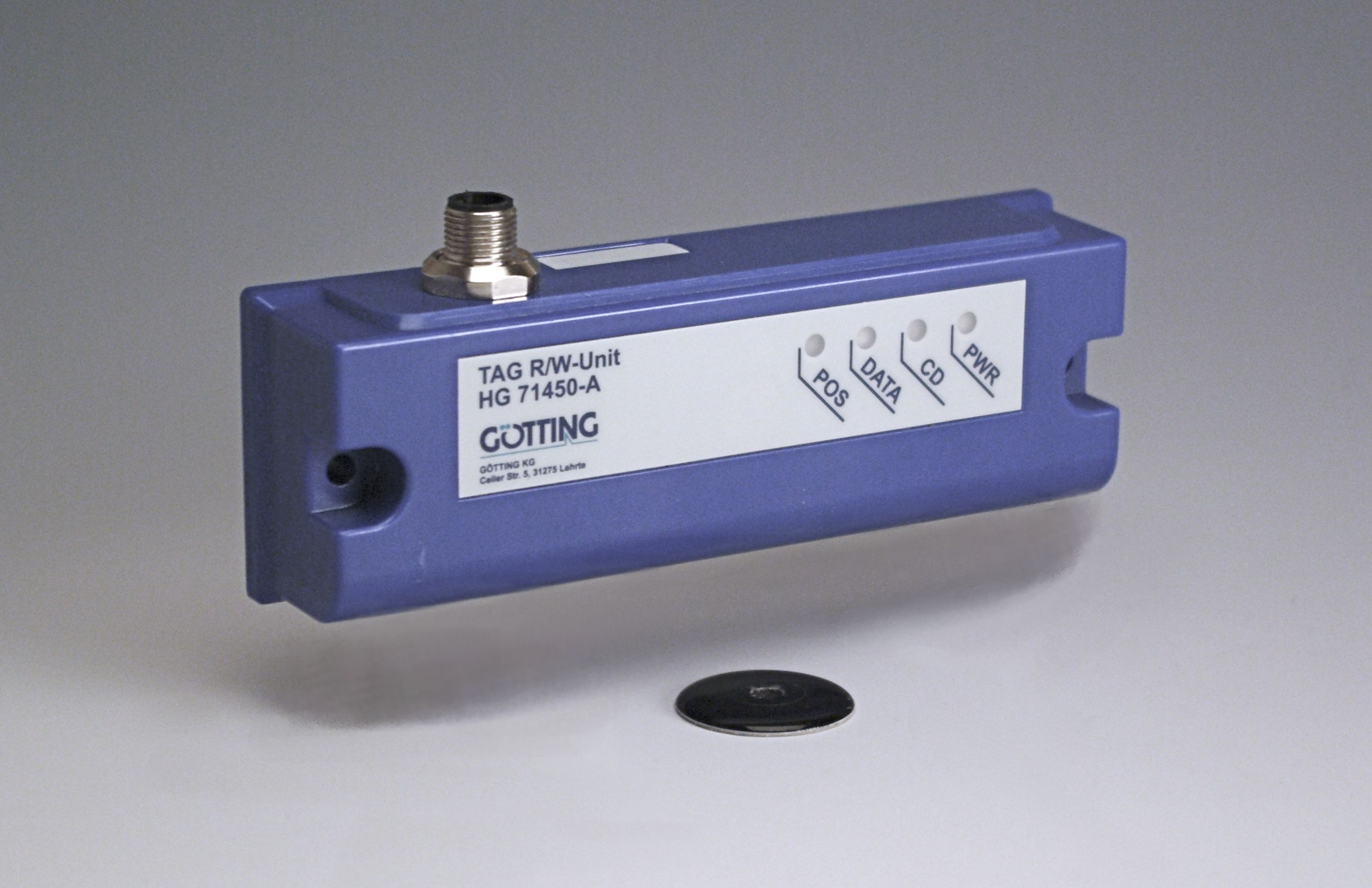 Komponenten für Raster-Navigation: Auswerteeinheit zur Detektion eines RFID-Transponders + Transponder, der in den Bodenbelag des Fahrwegs eingelassen und anschließend vergossen wird